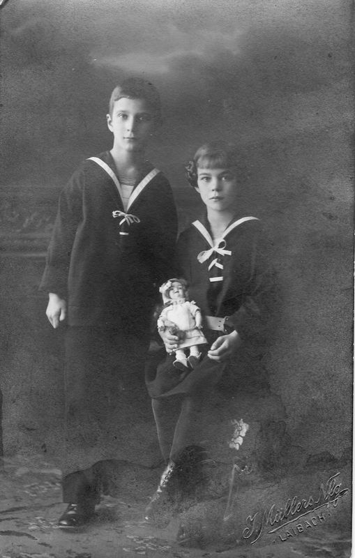 Mallász Gitta későbbi úszóbajnok, grafikus, írónő a testvérével, Ottomárral, gyermekkorukban